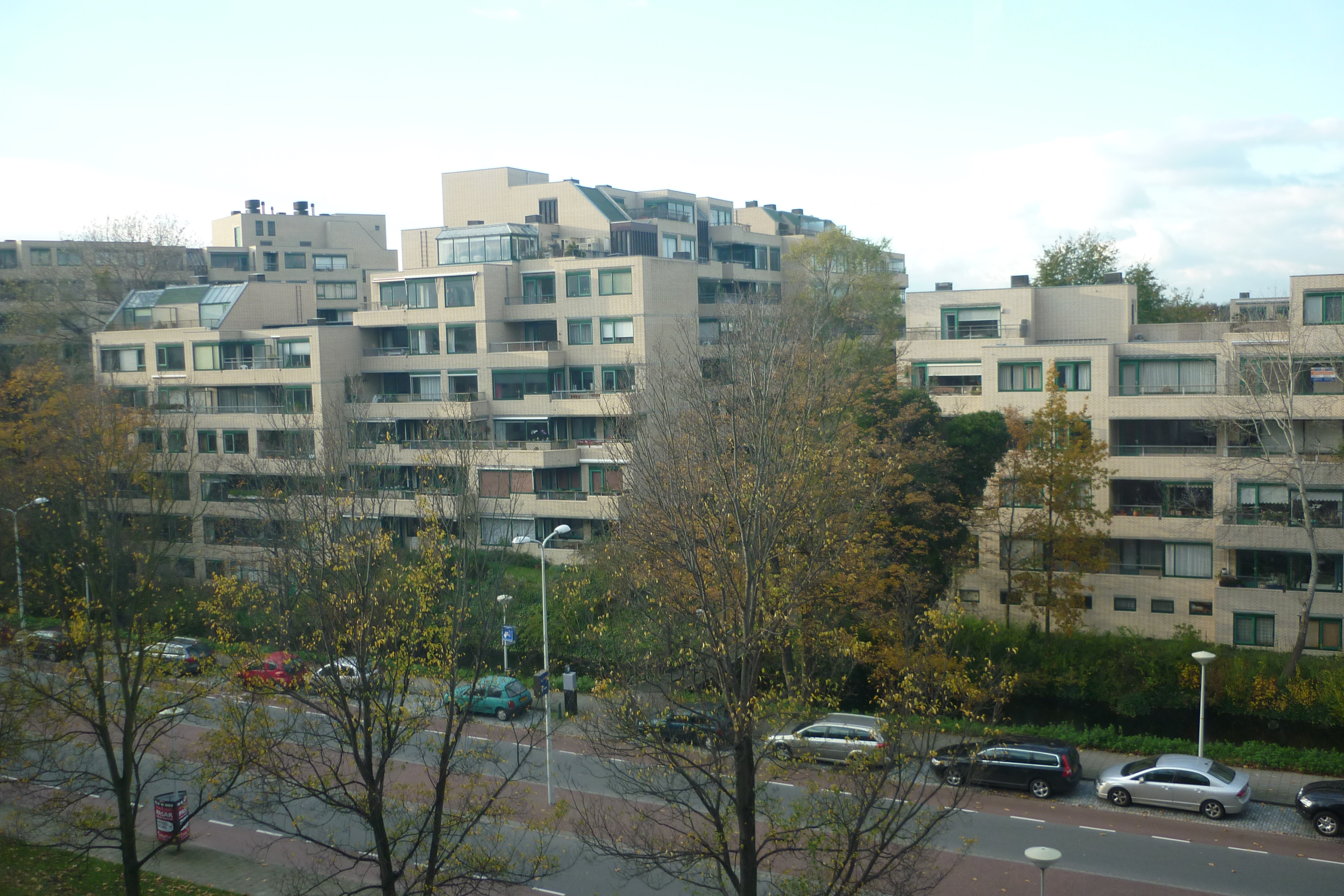 Couperusduin, Flatgebouw in Archipelbuurt, Den Haag